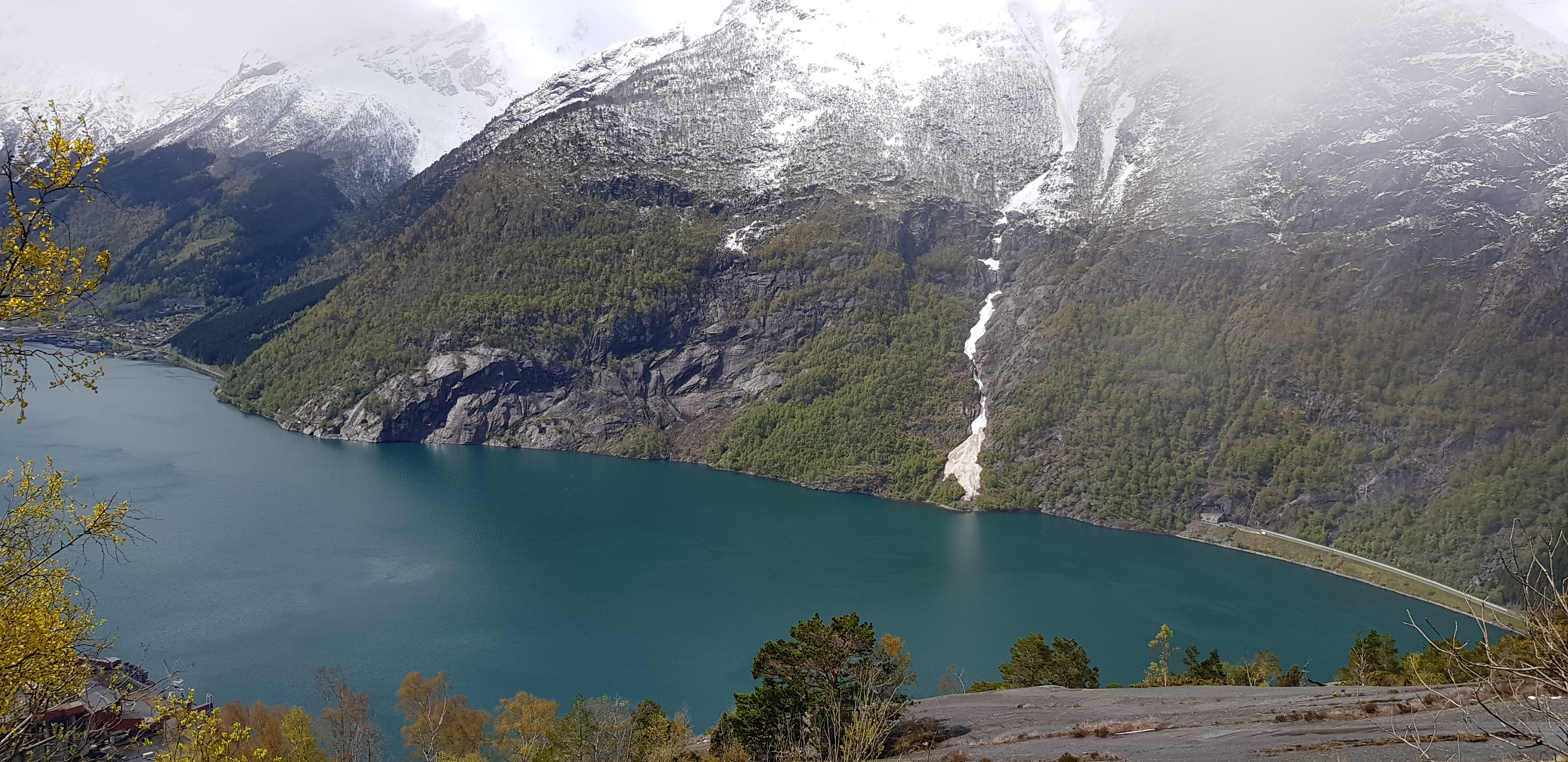 Eitrheimtunnelen ligger på vestsiden av Sørfjorden og går igjennom fjellområdet Mulen og Smylvehaugen.